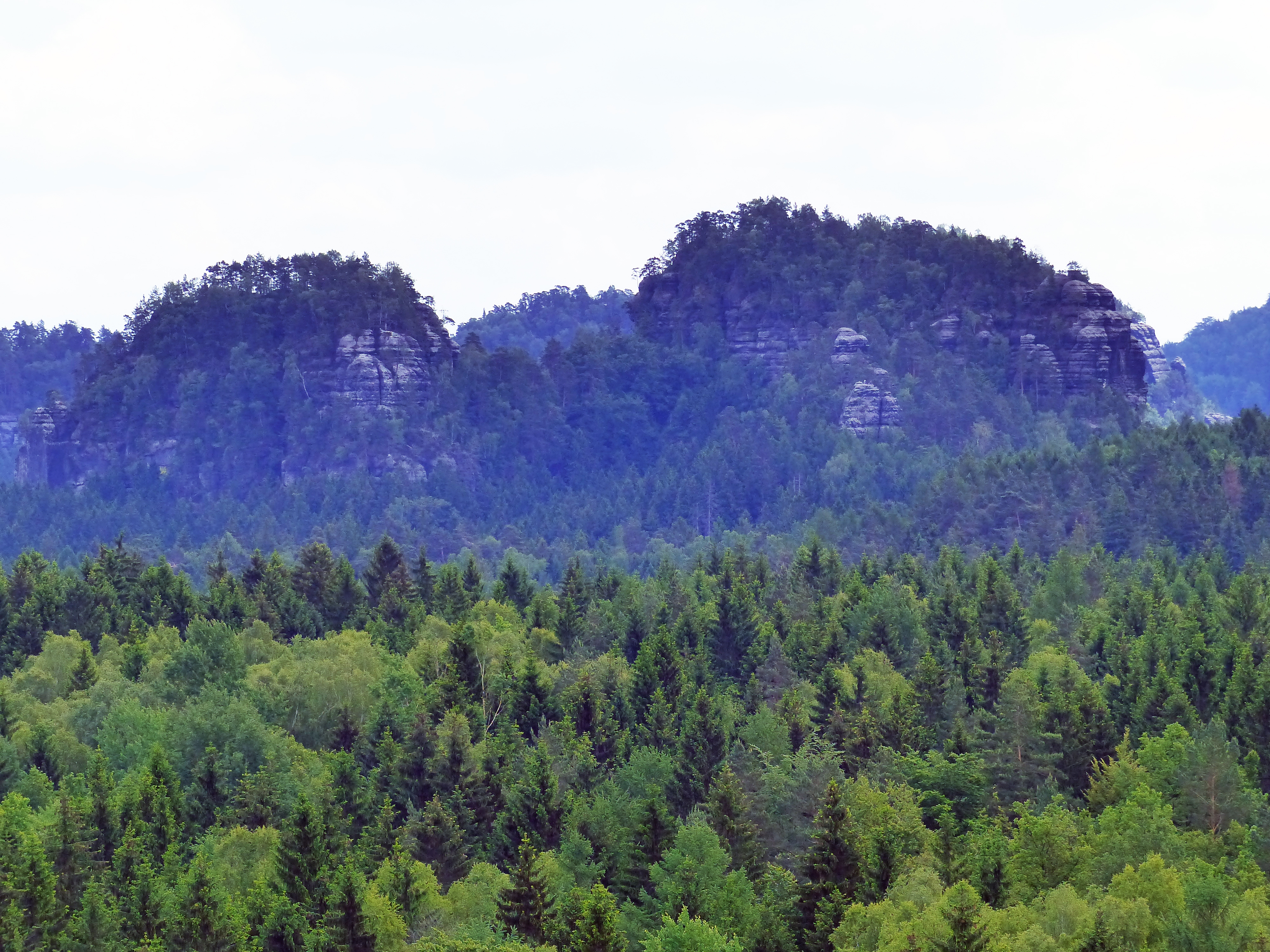 Lorenzsteine im Nationalpark Sächsische Schweiz, vom Kuhstall/Neuer Wildenstein aus gesehen